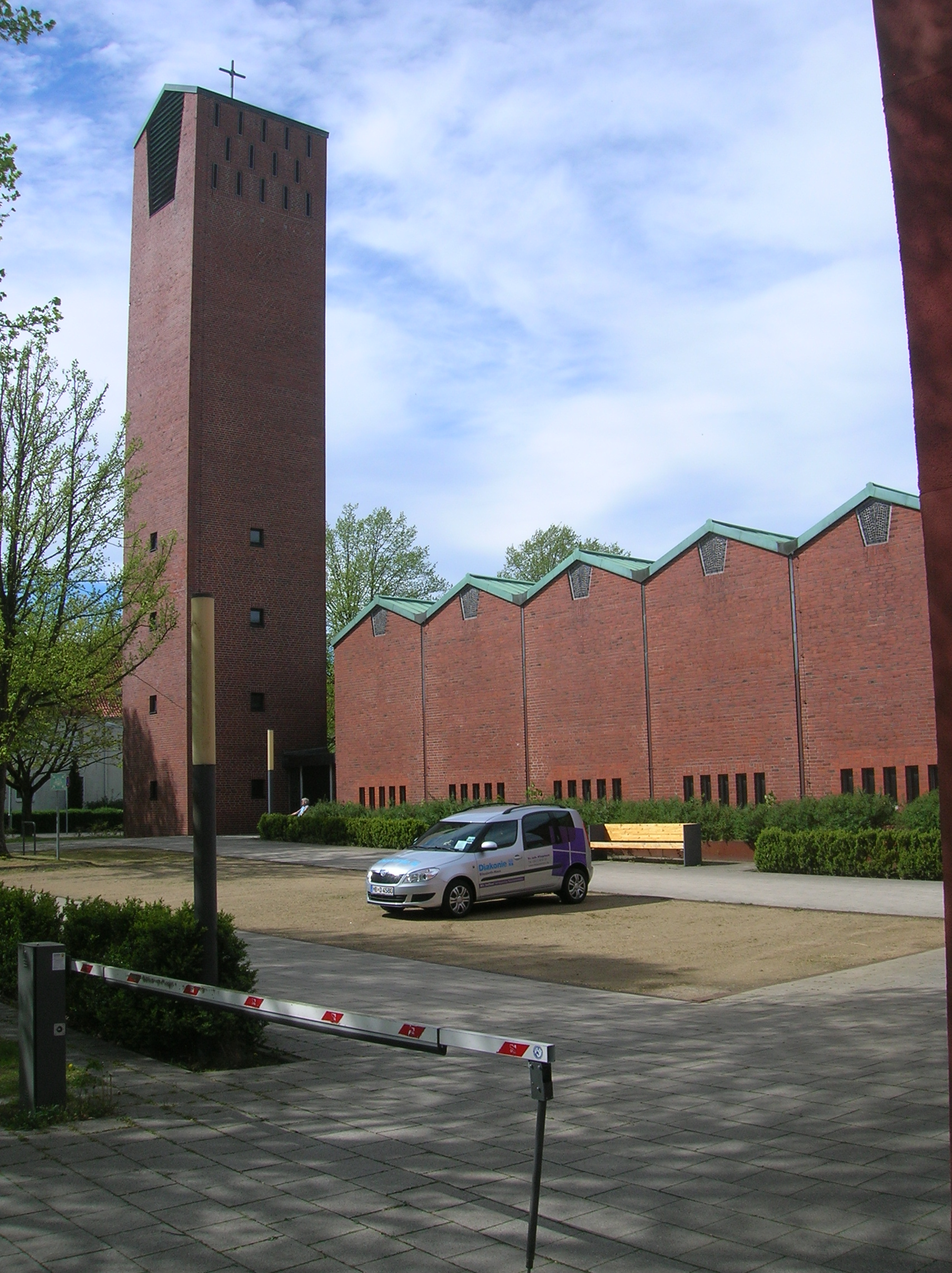 Matthäuskirche in Geestemünde-Süd, Bremerhaven. Zunächst stand kein Glockenturm und die Giebel erinnerten an Schuppen im Kaiserhafen. Deshalb wurde der Kirchenbau gelegentlich als „Bananenschuppen“ bezeichnet.